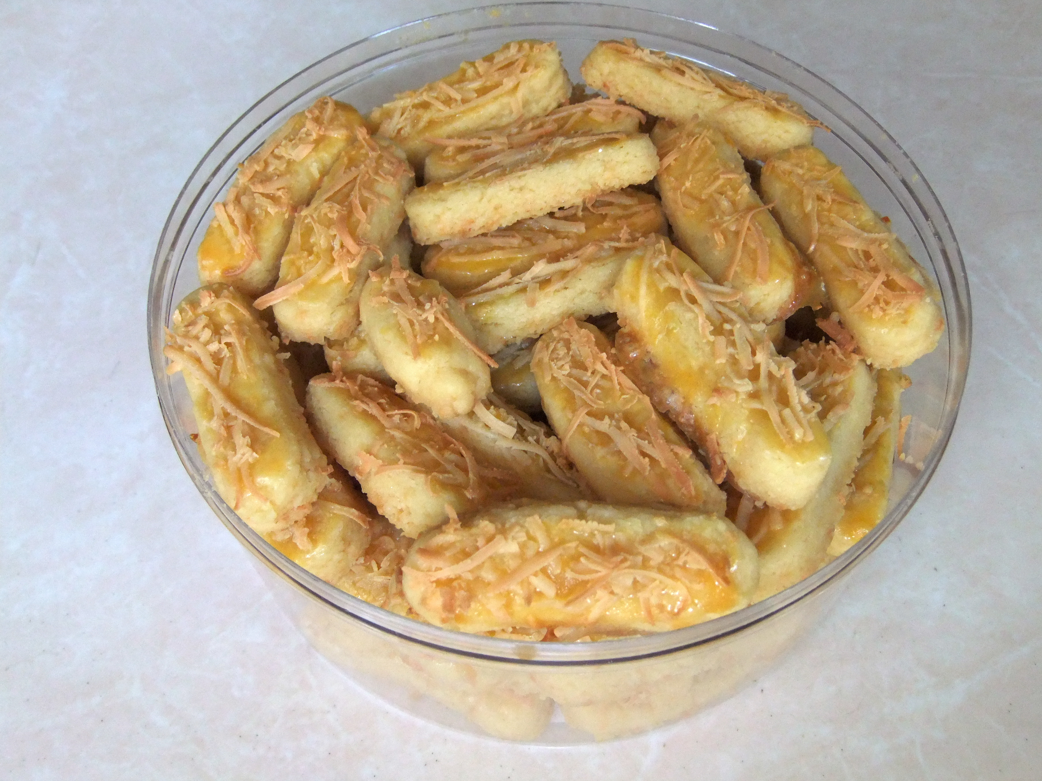 Kaasstengels